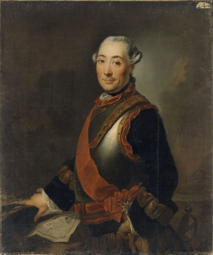 Marc-René, marquis de Montalembert (1714-1800)